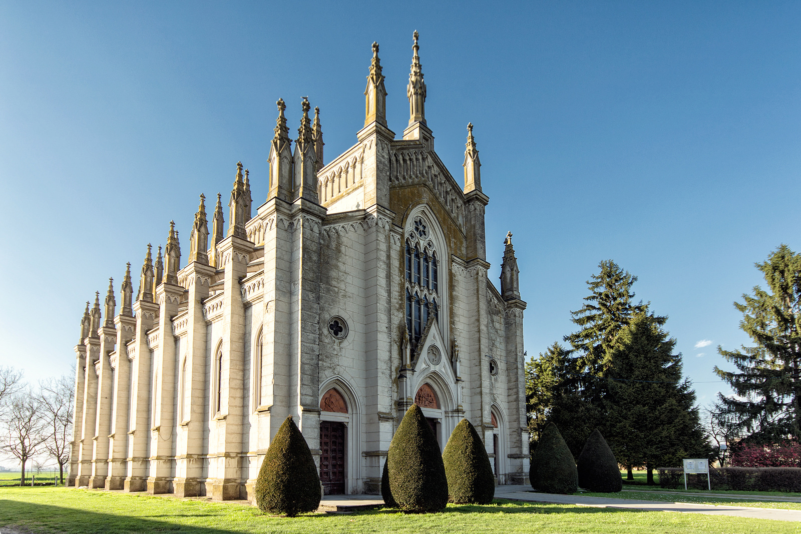 La chiesa preesistente fu demolita perché ritenuta pericolante, costruita a metà Cinquecento e dedicata a Santa Caterina d’Alessandria. Ne 1917 i lavori di costruzione del nuovo edificio furono portati a termine - eseguiti secondo i canoni stilistici del neogotico su progetto dell’architetto Alfredo Provinciali - lo stesso presule volle che la nuova chiesa fosse benedetta sotto il titolo di «Gesù adolescente principe di pace».